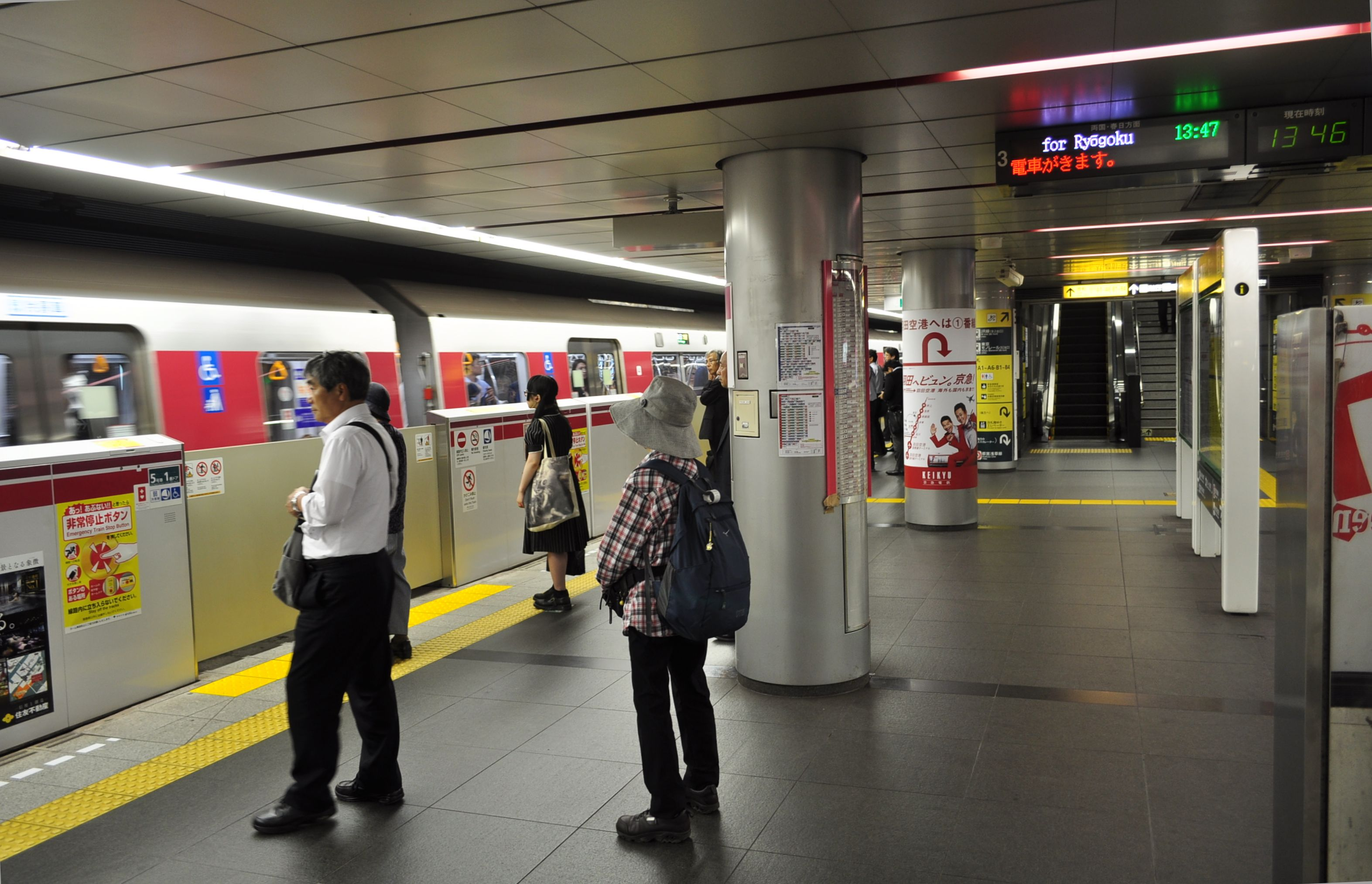 大門駅ホーム